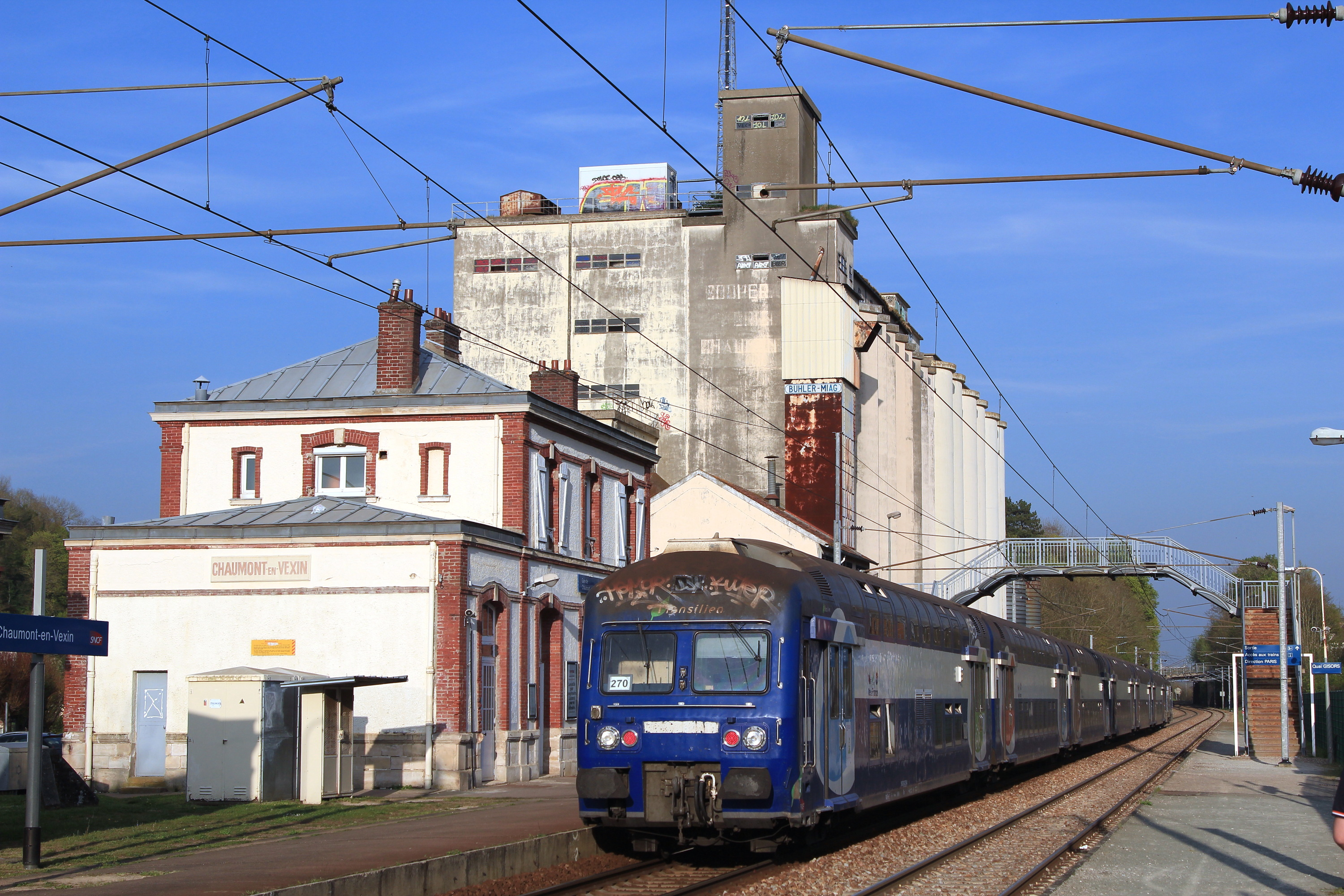 Un train Gisors - Paris-Saint-Lazare en gare de Chaumont-en-Vexin.